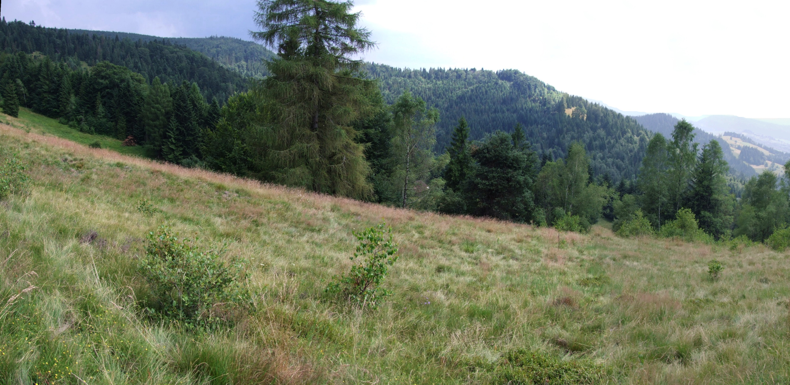 Polana Szałasy Jarzębackie w Beskidzie Sądeckim (Pasmo Jaworzyny). Widok na wschodnią stronę